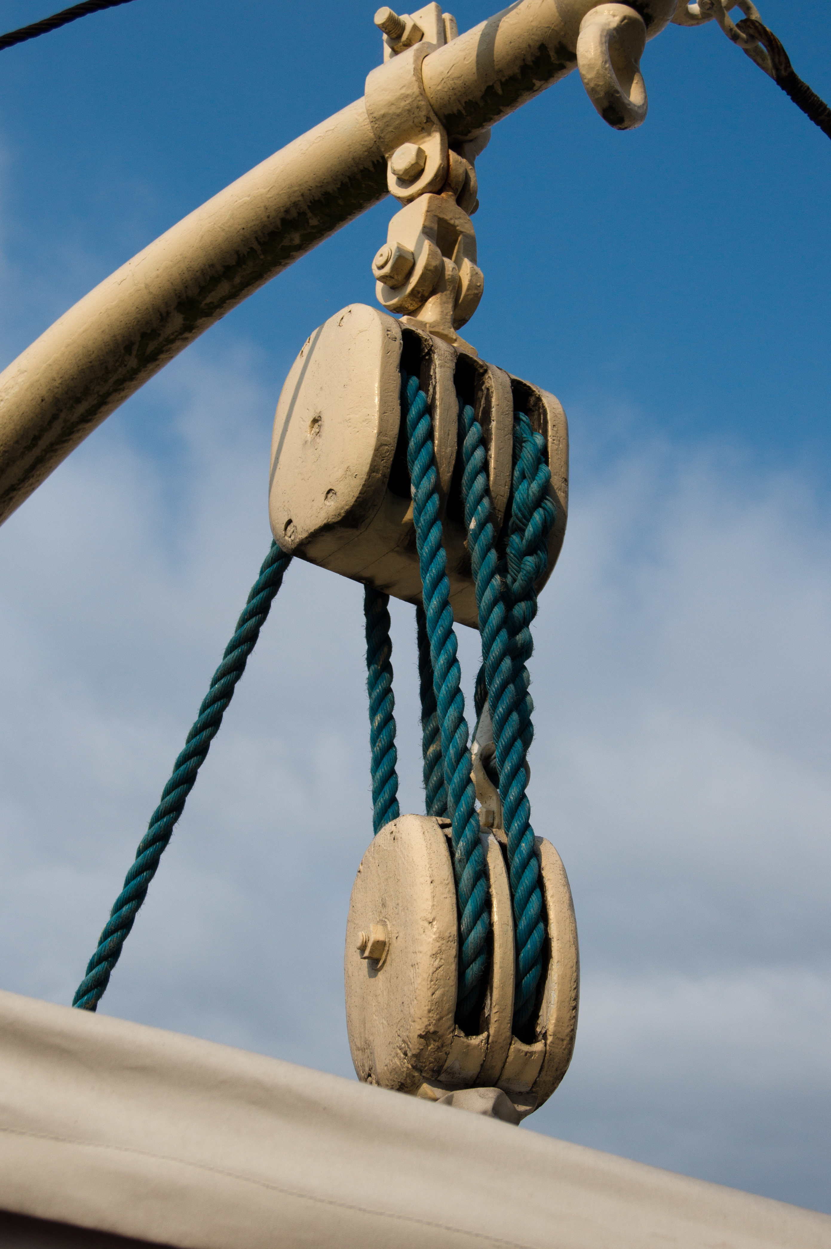 Palans